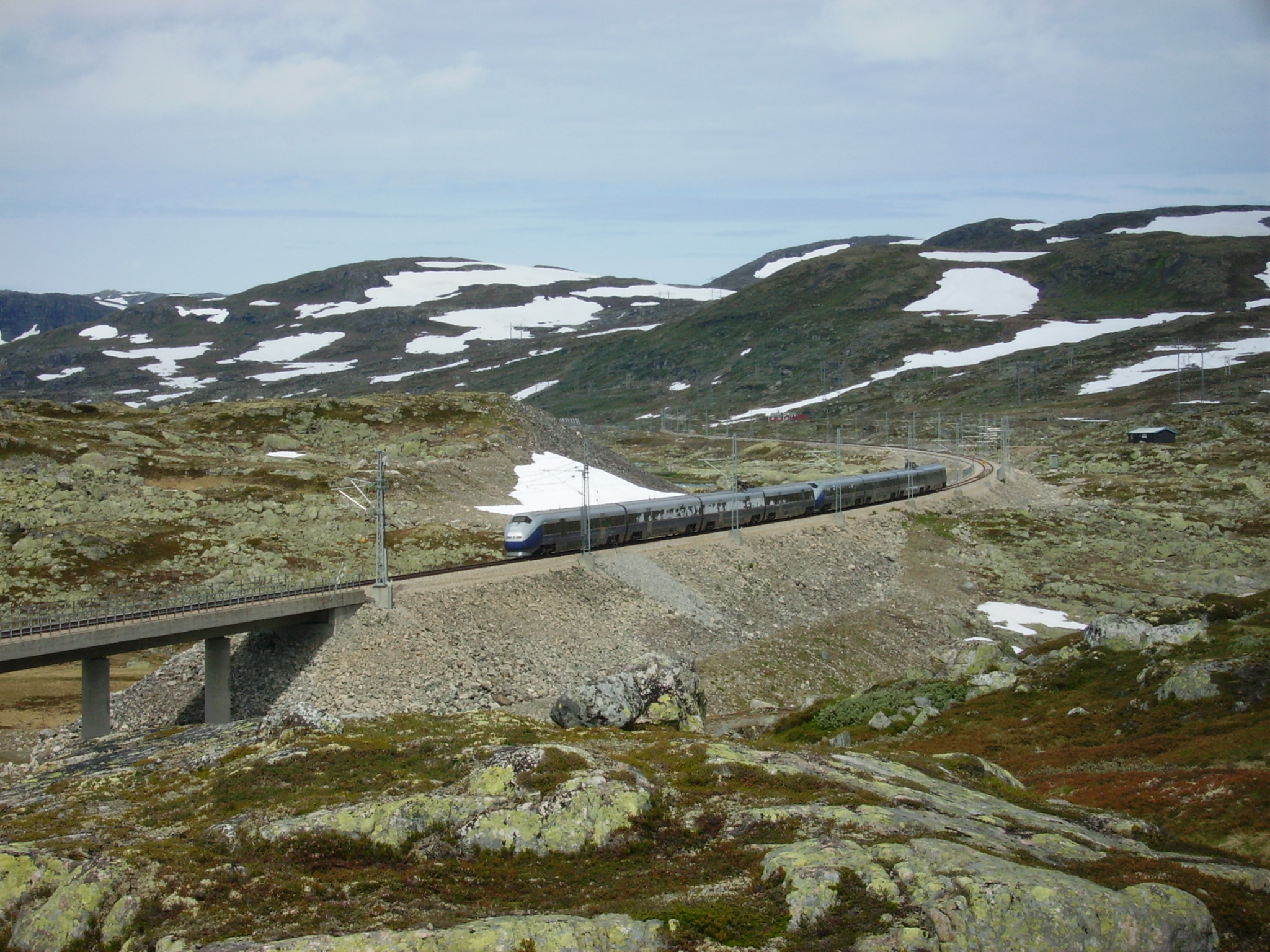 Rallarvegen